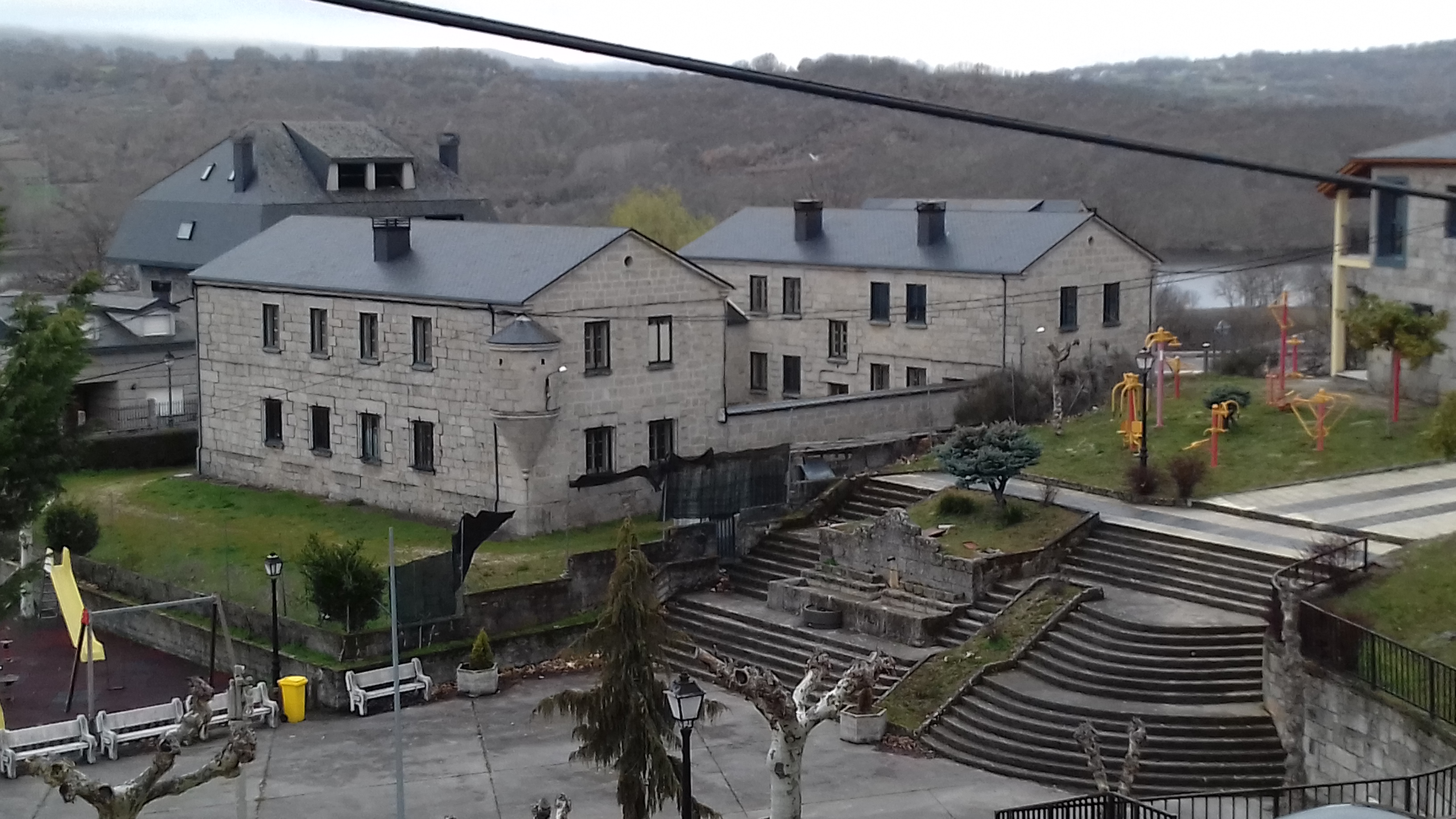 Casa cuartel da garda civil na Veiga